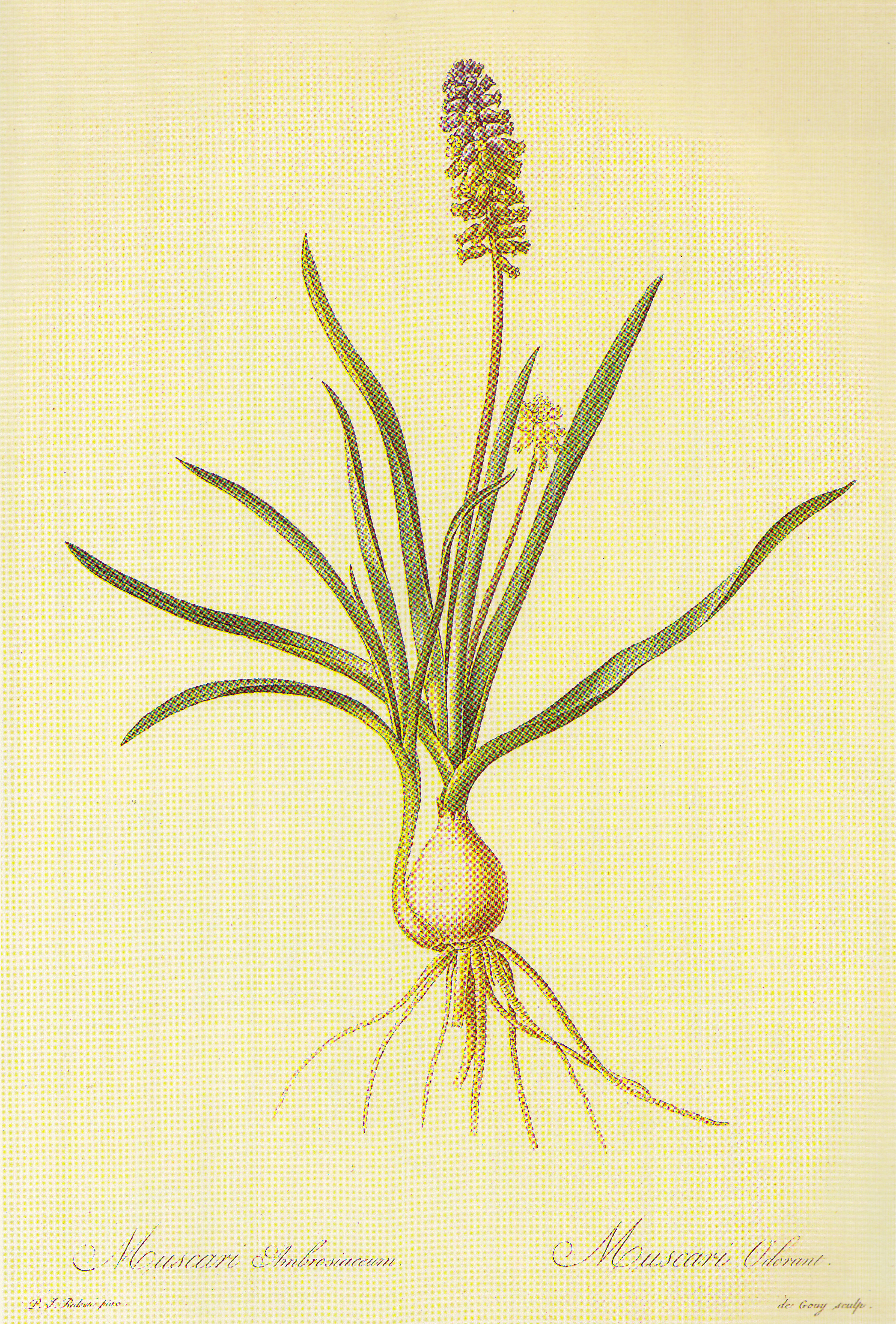 麝香葡萄百合。原产于亚洲。